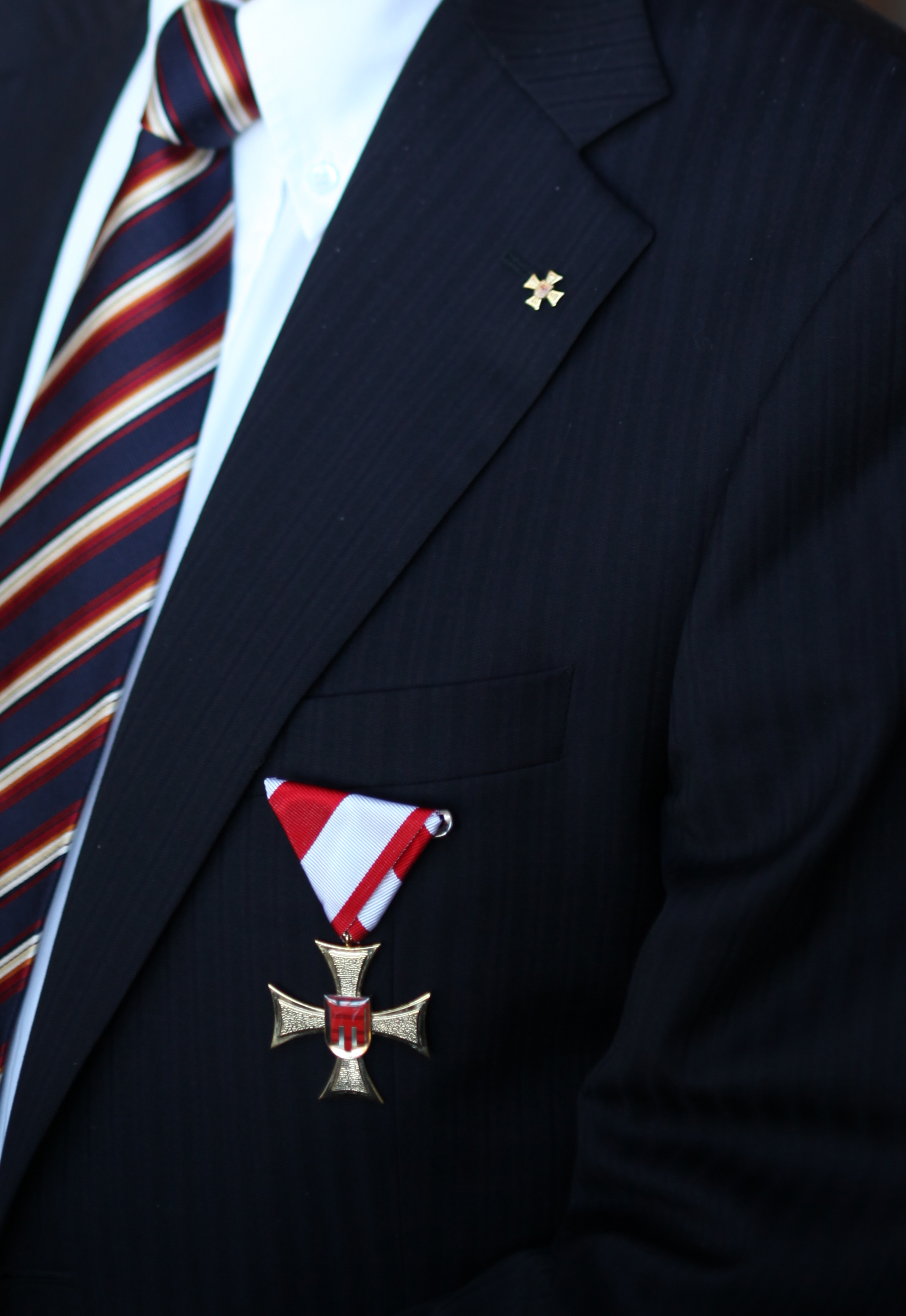 Das große Verdienstzeichen auf der Brust getragen sowie die Miniaturausführung am Kragen. Ausschnitt aus dem Portrait von Dr. Edwin Oberhauser (2014)